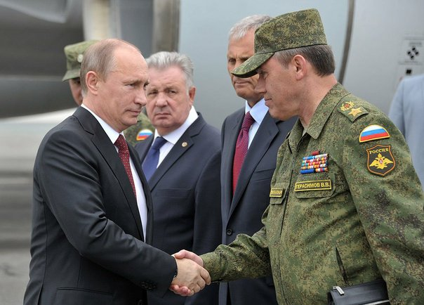 Президент России Владимир Путин и начальник Генерального штаба Валерий Герасимов. Комплексная проверка войск Восточного военного округа. Сахалинская область.